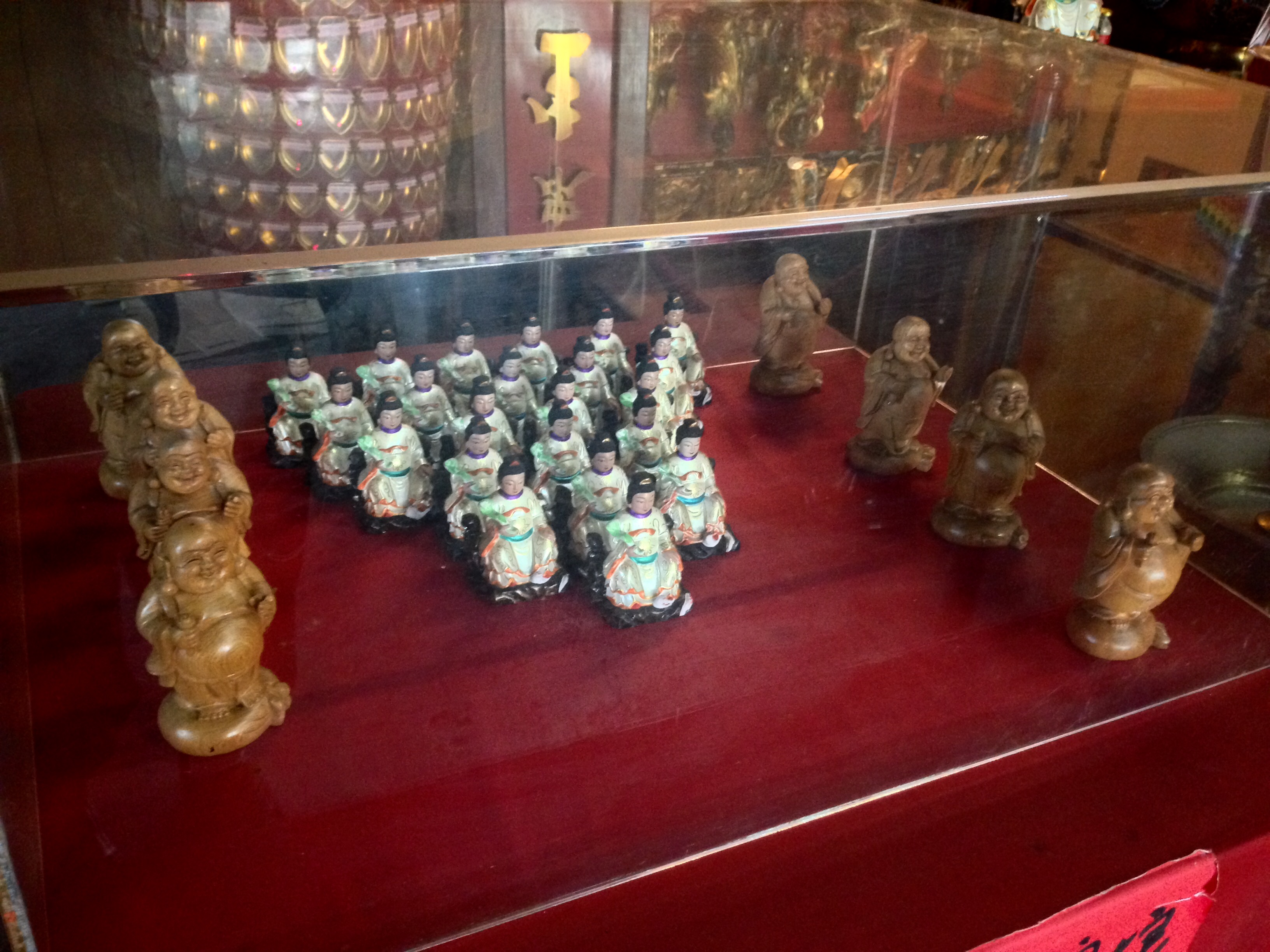 中文（台灣）: 白蛇廟白蛇娘娘神像